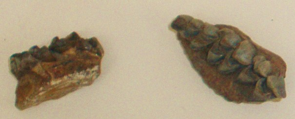 Fossil of Dorcatherium, an extinct mammal -- Took the photo at Natural History Museum, London